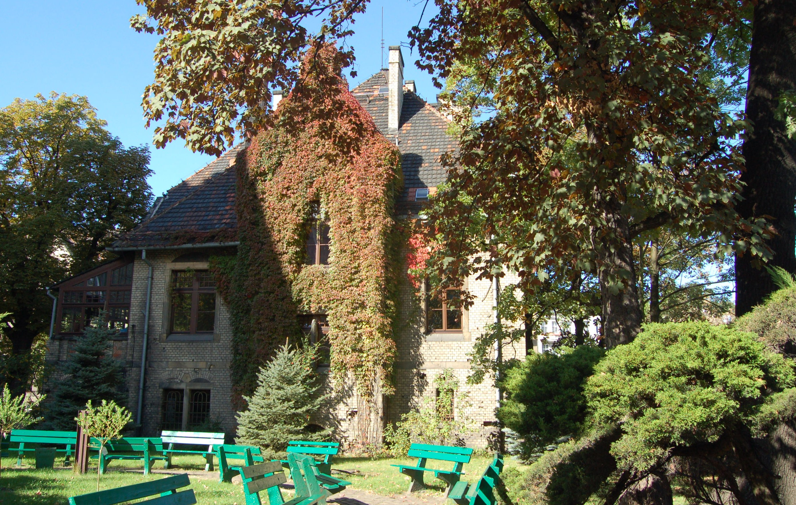 budynki Instytutu Pedagogiki i Psychologii Uniwersytetu Wrocławskiego, dawniej Zespół Gimnazjum św. Elżbiety:- budynek mieszkalny, d. dom rektora Dawida 3, Miasto Wrocław - Krzyki